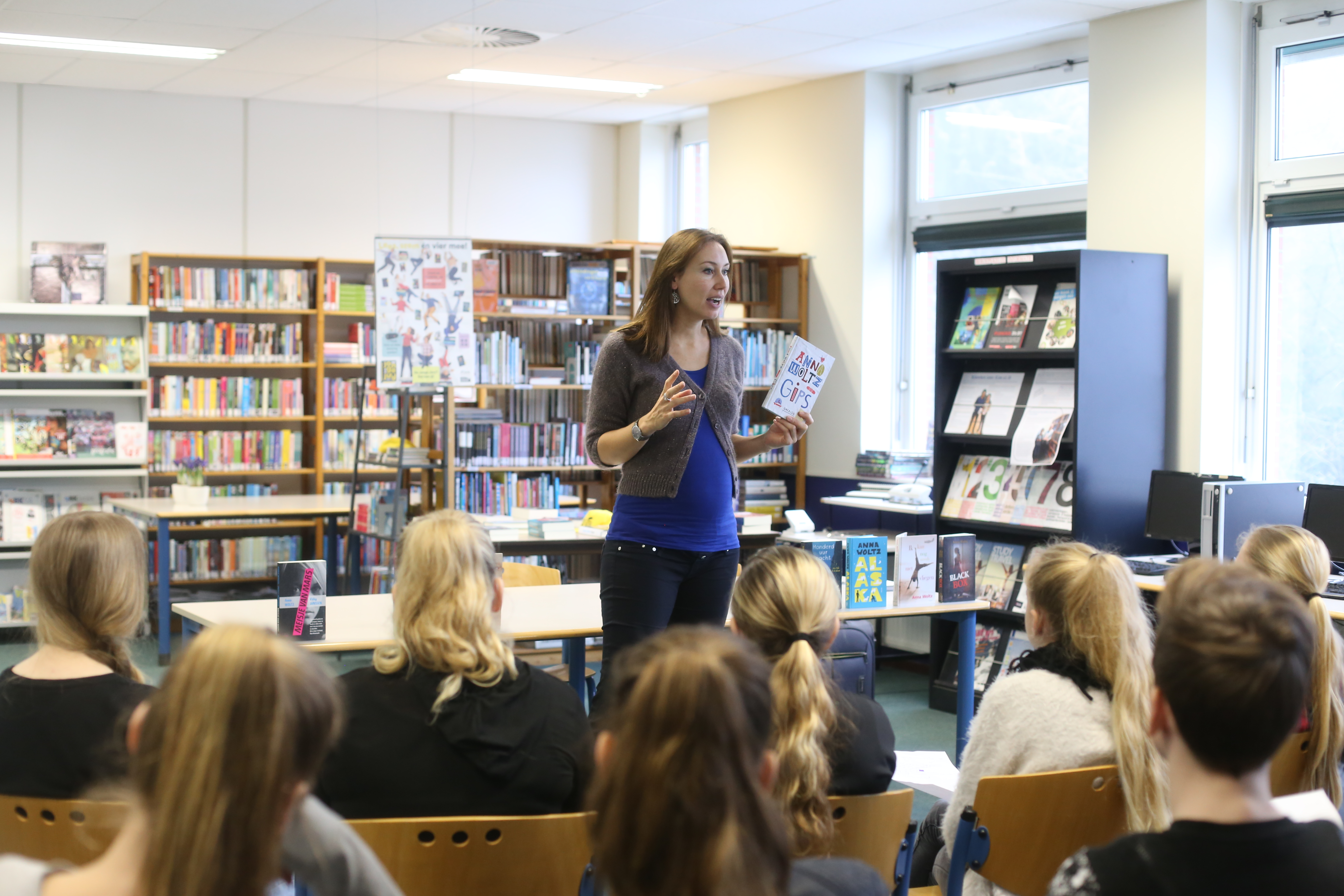 Schrijfster Anna Woltz tijdens een schoolbezoek aan het Esdal College in Emmen